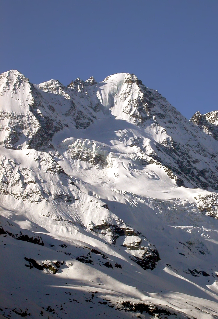 La Roccia Viva - Alpi Graie - Italy